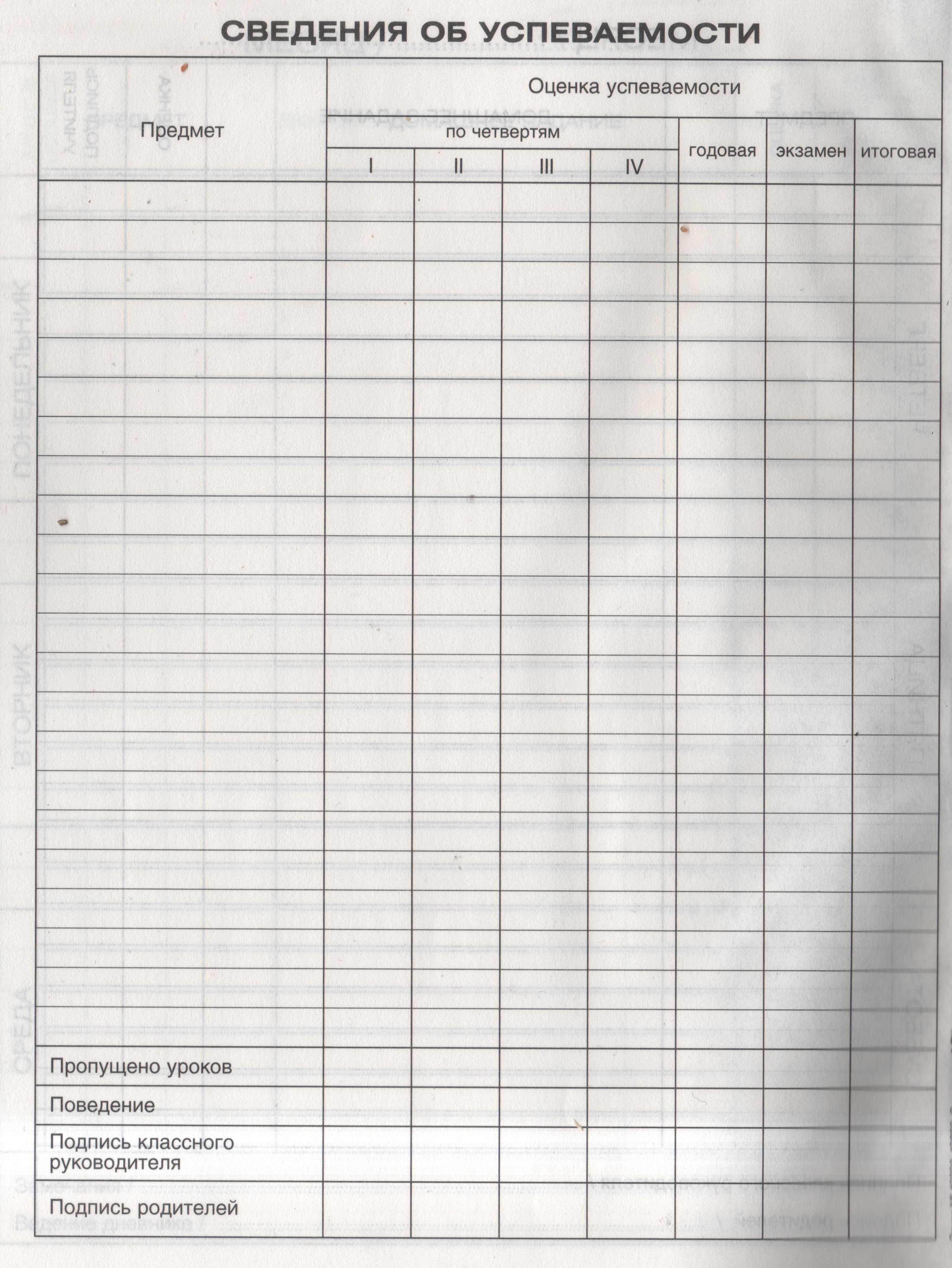 Сведения об успеваемости (дневник школьника)